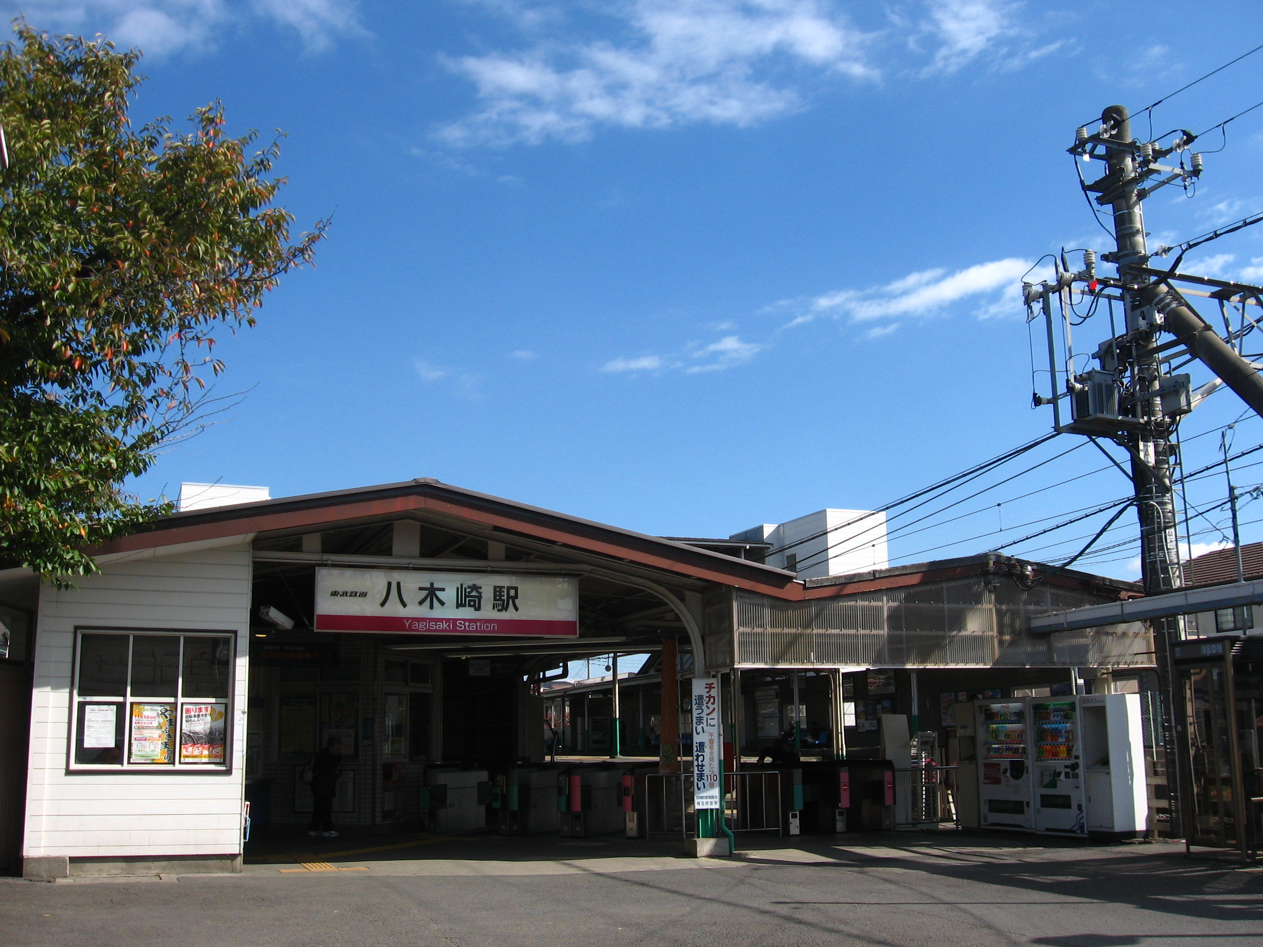 東武野田線・八木崎駅駅舎